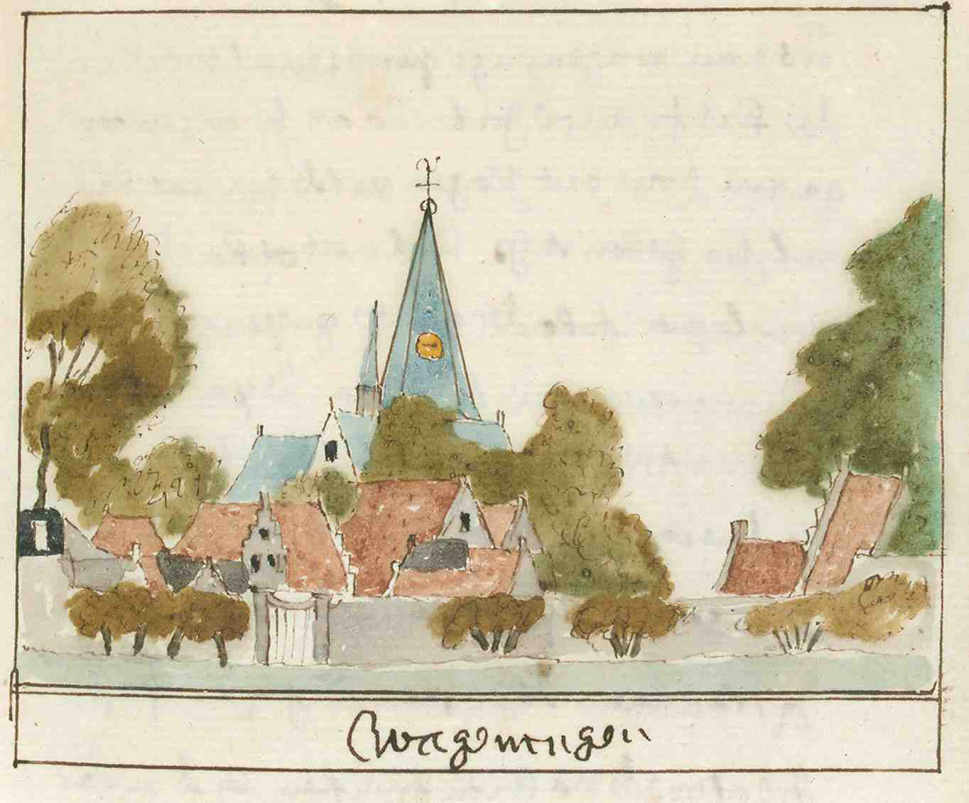 Beschrijving van Gelderland door Schoemaker